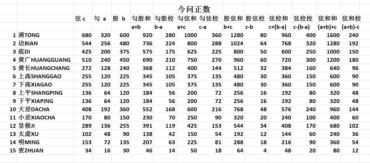 测圆海镜 今问正数表